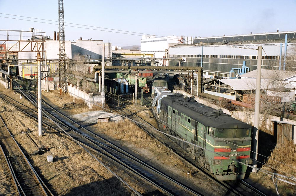 Вид на территорию Уссурийского ЛРЗ